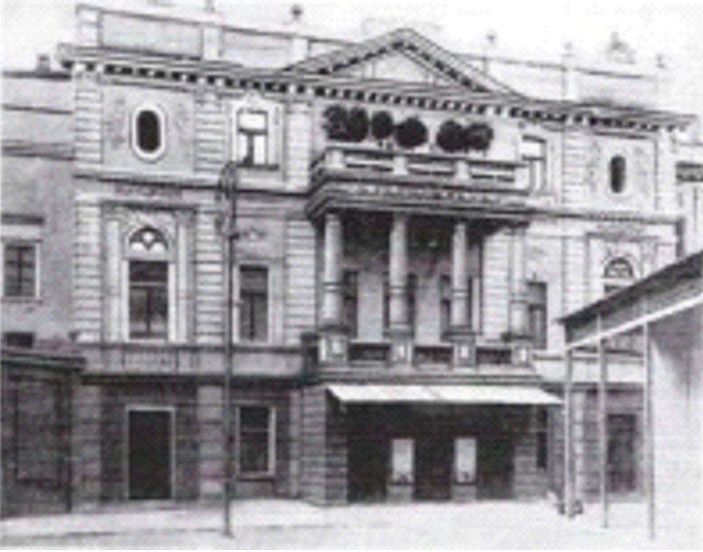 Teatr Wielki (1902-1920) Fryderyka Sellina w Łodzi przy ul. Konstantynowskiej